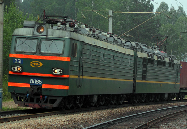 Электровоз ВЛ85-231 с грузовым поездомРоссия, Красноярский край, перегон Сорокино - Красноярск-Восточный